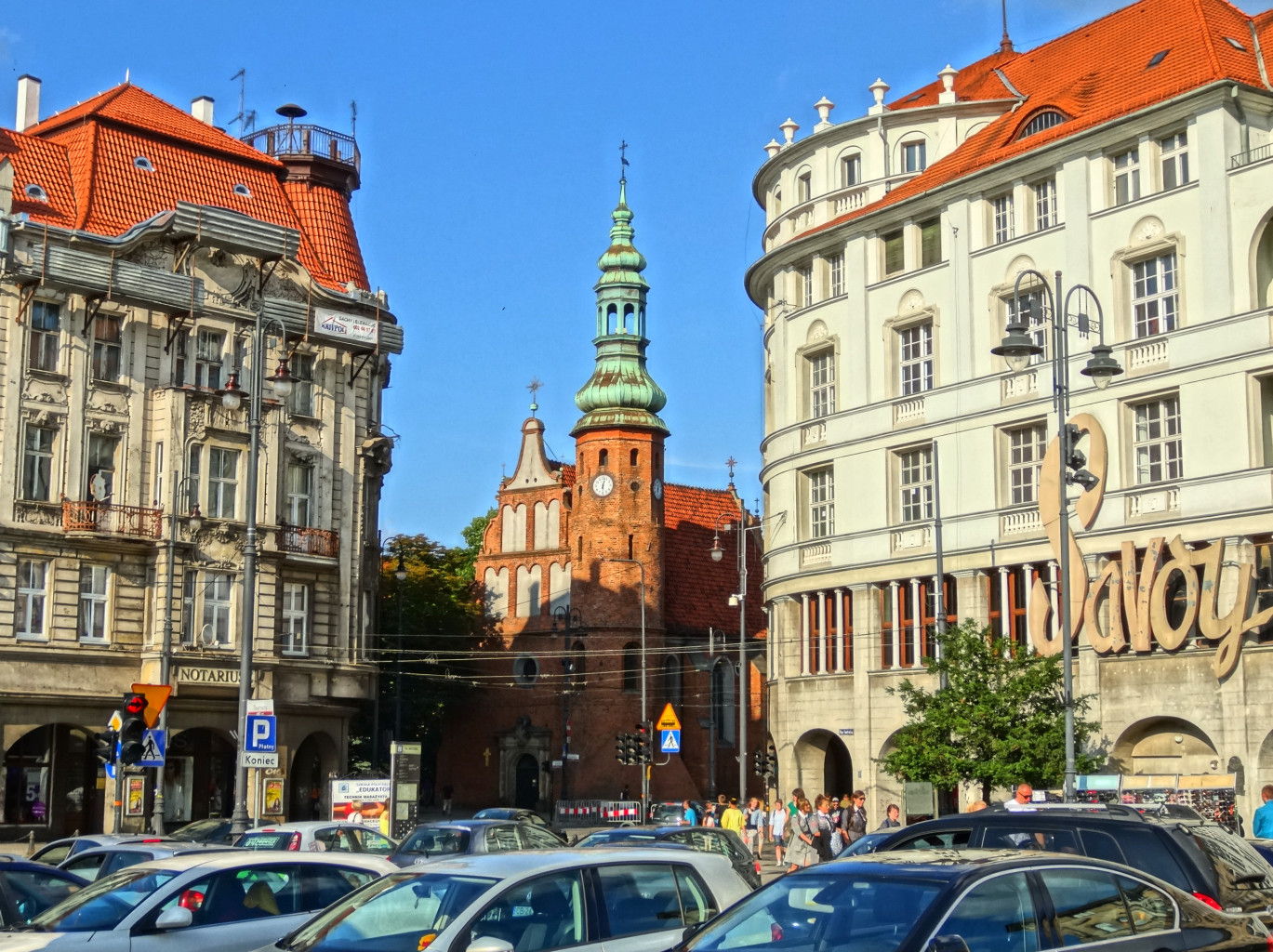 Kościół p.w. Wniebowzięcia Najświętszej Marii Panny w Bydgoszczy (zbud. 1582-1615, do 1835 r. kościół klasztorny klarysek bydgoskich)